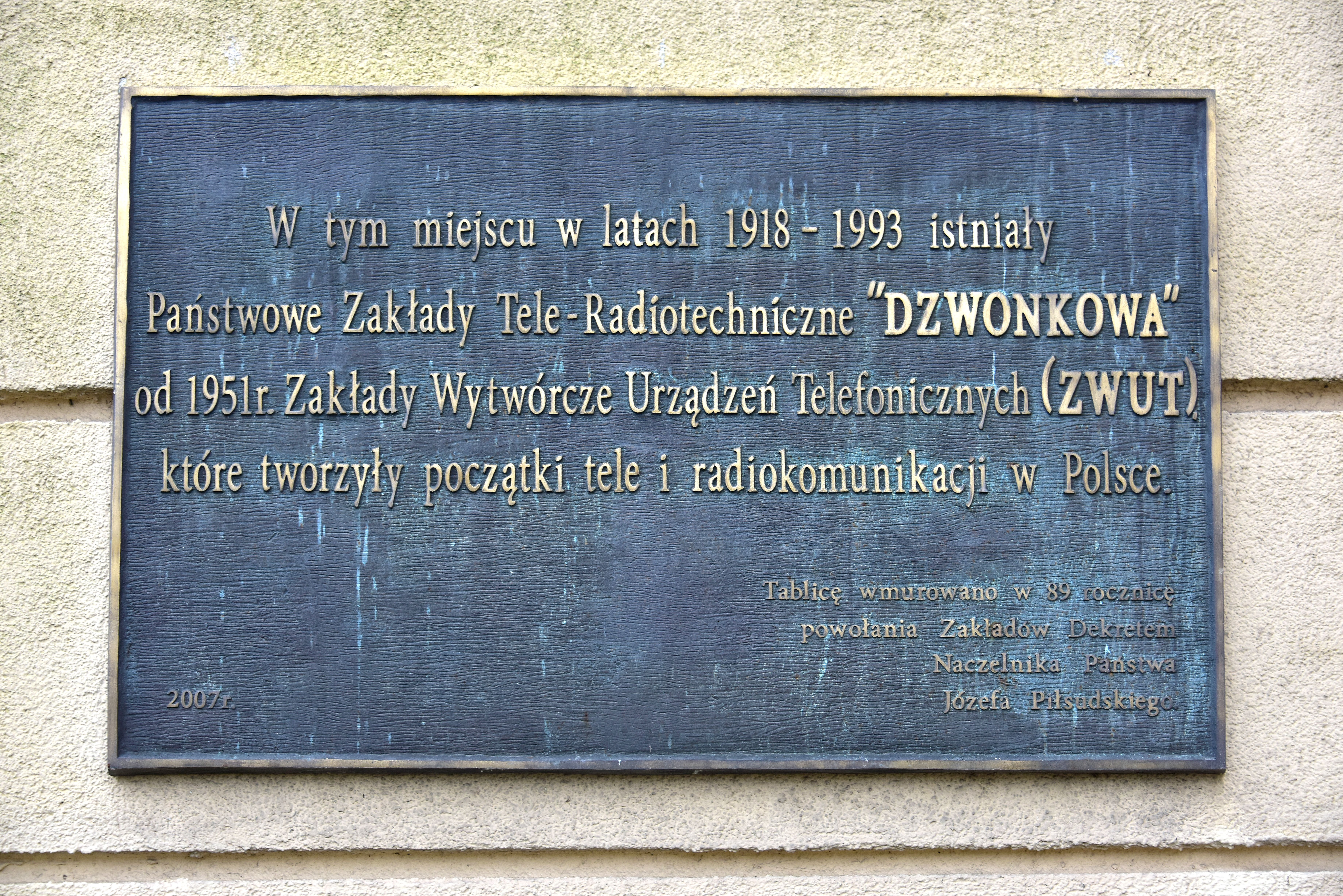 Tablica upamiętniająca Państwowe Zakłady Tele- i Radiotechniczne ("Dzwonkową") przy ul. Grochowskiej 341 w Warszawie